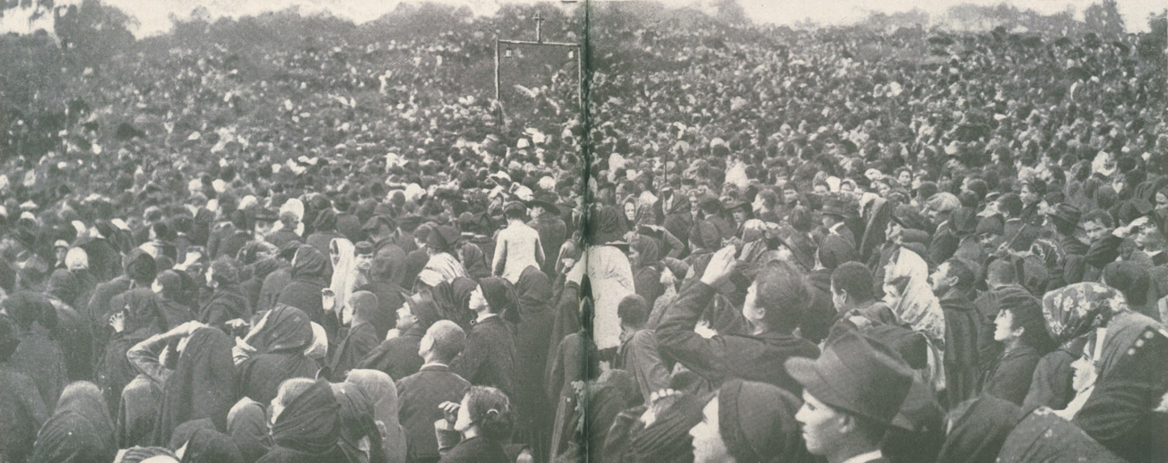 Foule compacte, près du chêne des apparitions, assistant au Miracle du soleil le 13 octobre 1917